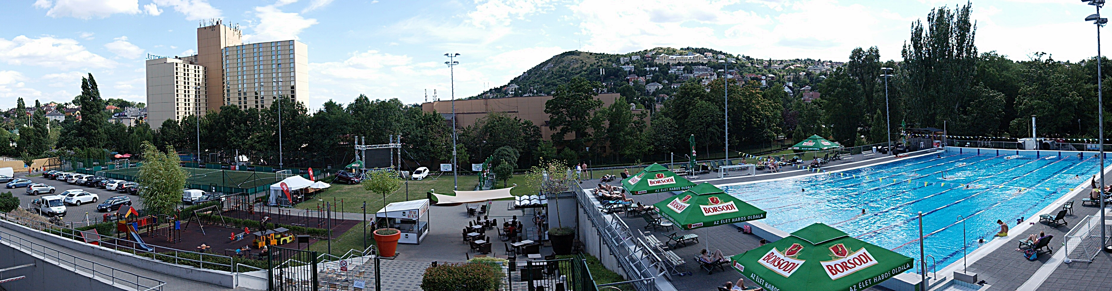 Sas-hegy. A Csörsz utcai MOMSPORT-ból fényképezve. Előtérben a Novotel Hotel, illetve a sportkombinát (Budapest, XII. kerület, Csörsz utca 14-16.)